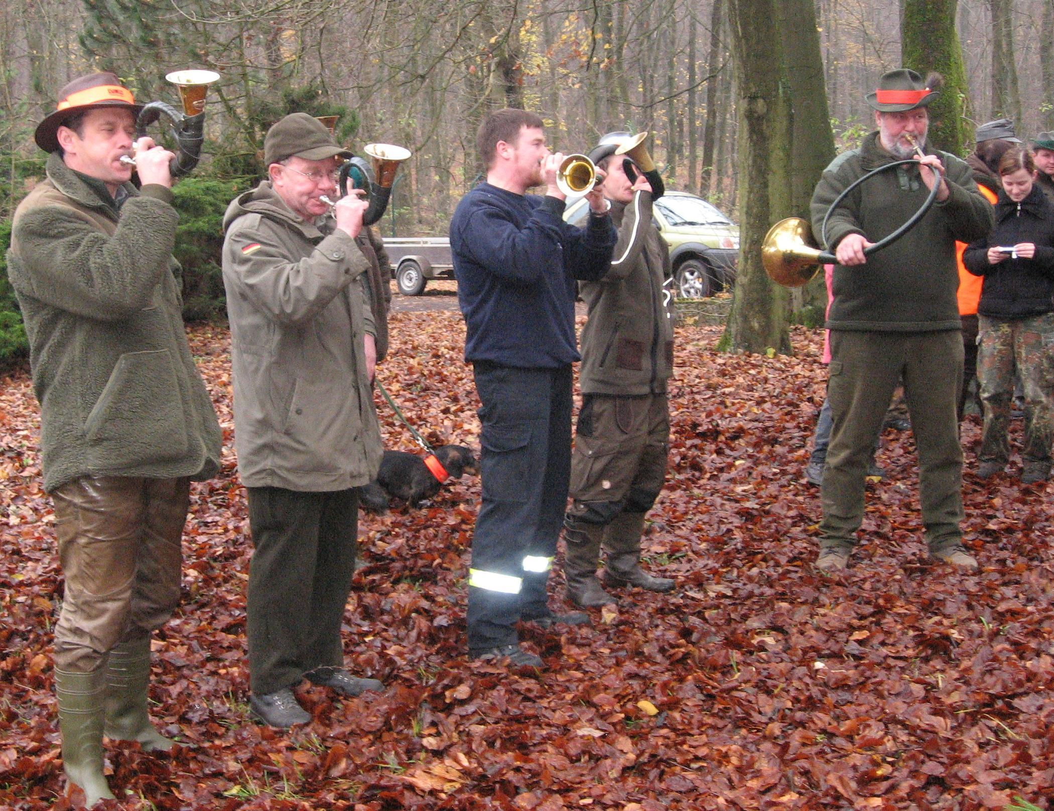 Jagdhornbläser bei der Hainichjagd.